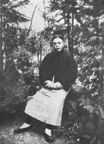 王靜安先生壯年小像